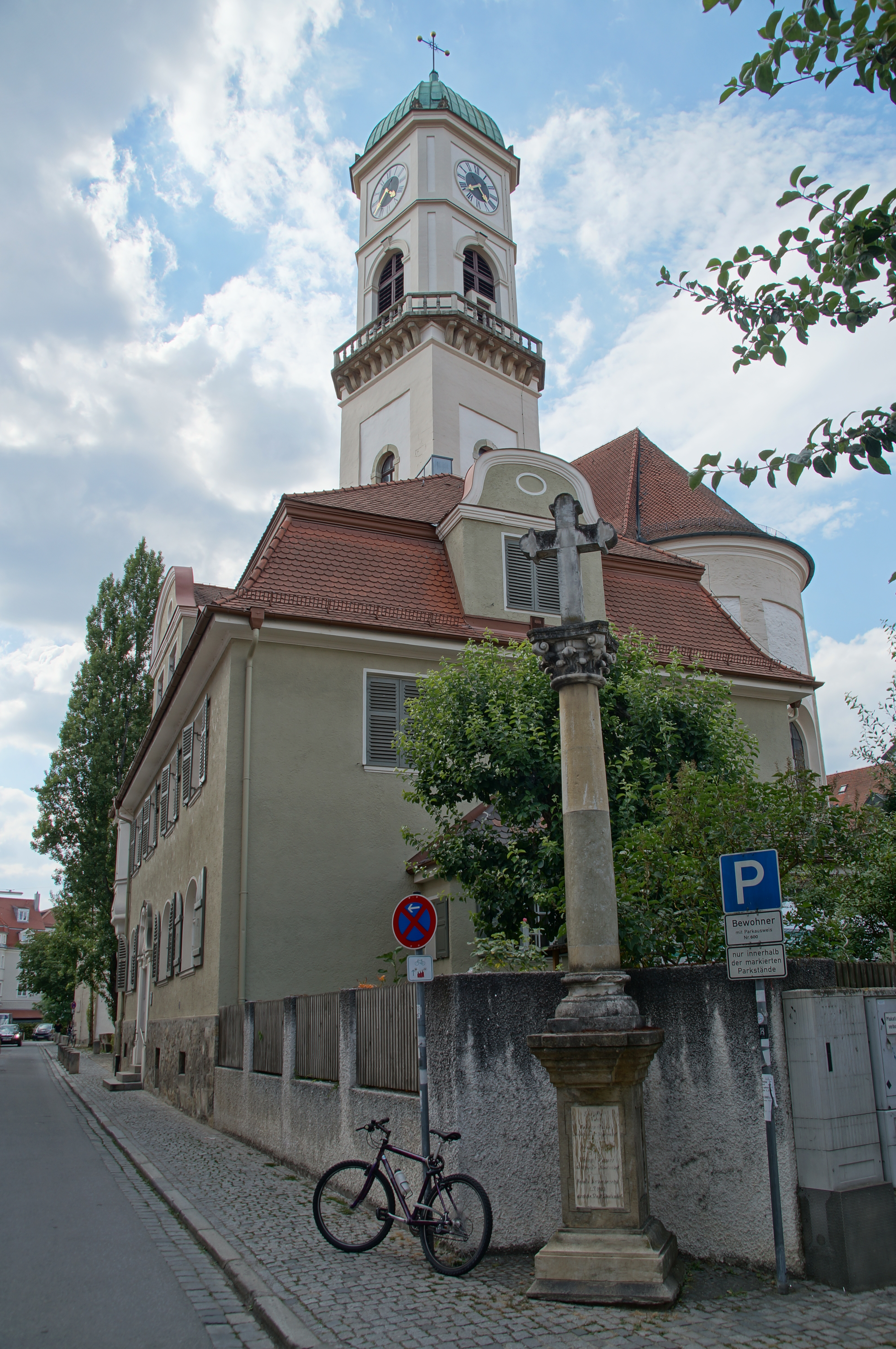 Fischlsäule, ein Wegkreuz an der Kreuzung Andreasstraße, Seifensiedergasse in Regensburg, Stadtamhof. Im Hintergrund St. Andreas und St. Mang